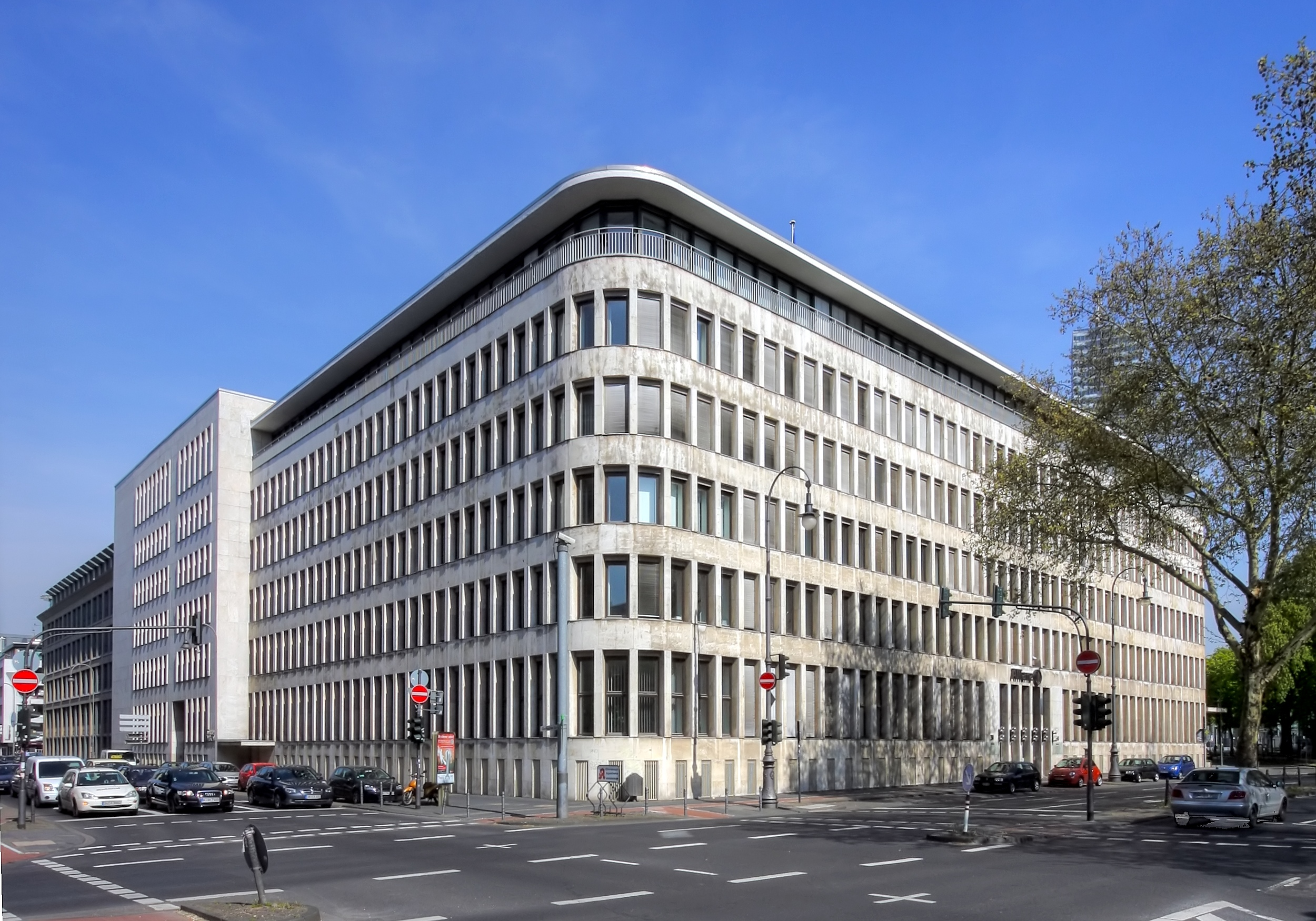 Gebäude der Allianz, Kaiser-Wilhelm-Ring 31-41, 50672 Köln. Architekt: Heinrich Rosskotten und Karl Wach, Baujahr: 1930-31